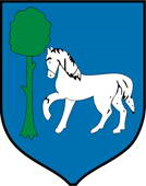 Herb gminy Wisznice